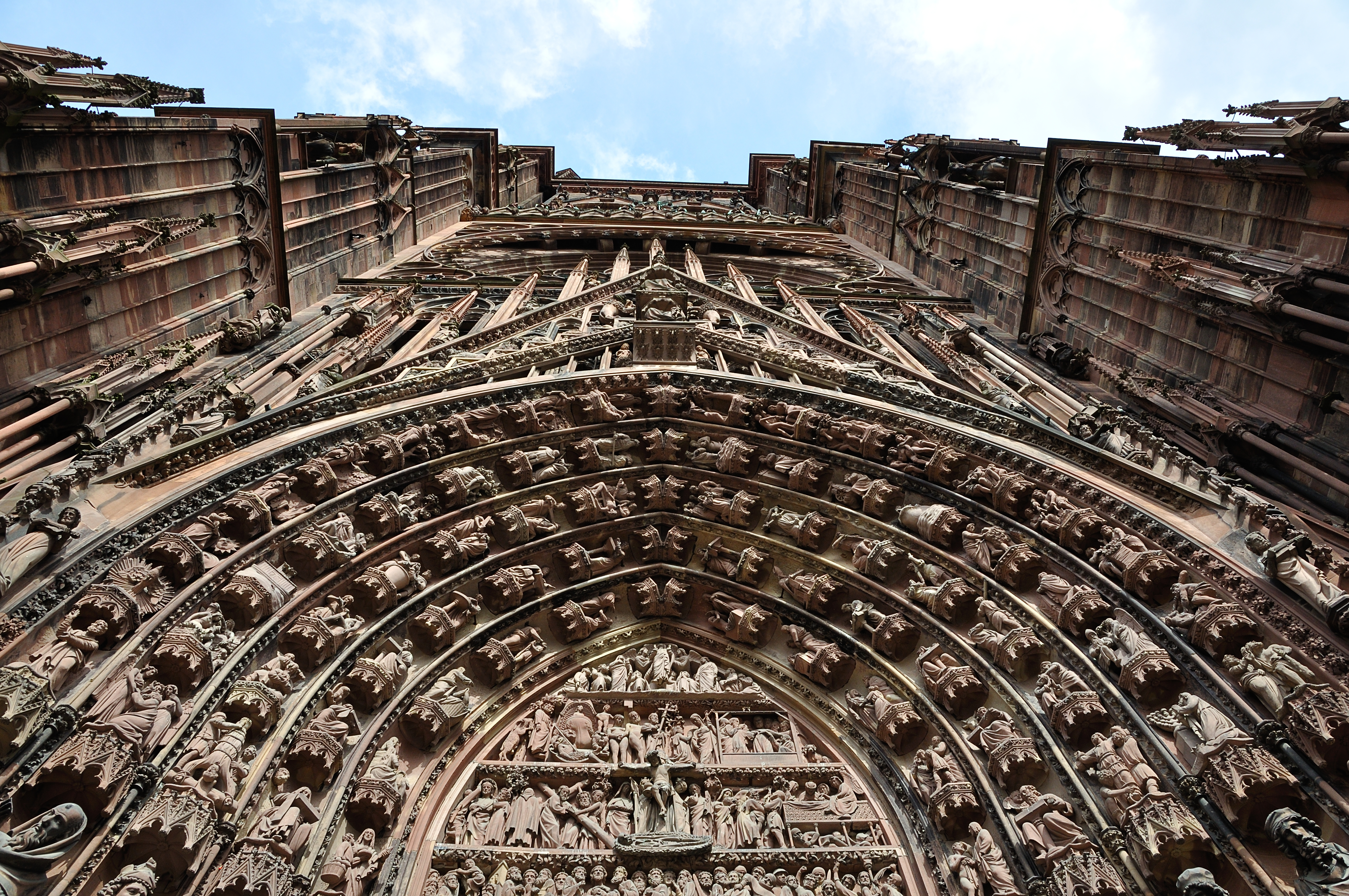 Tympan du portail central de la façade ouest de la Cathédrale de Strasbourg. .